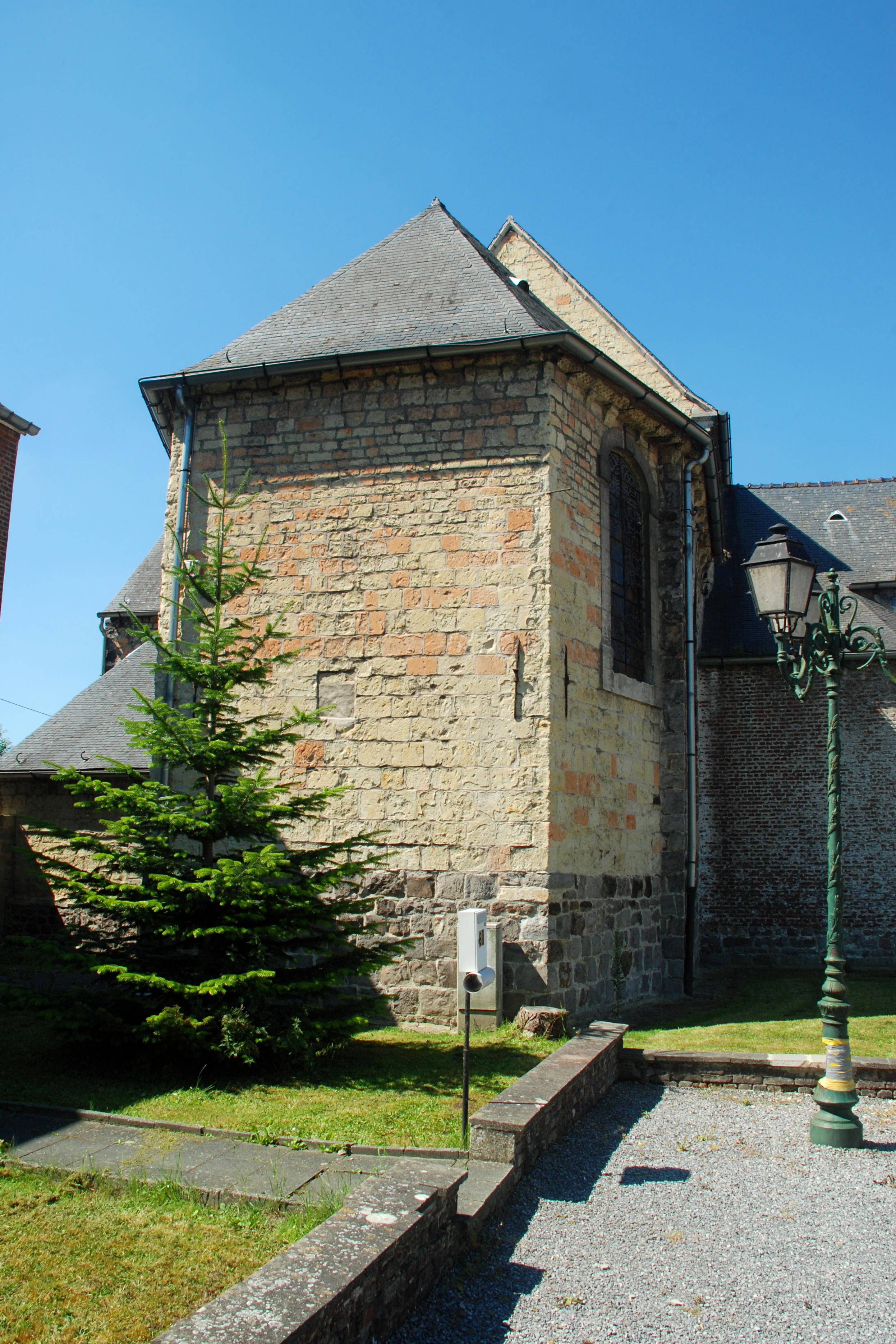 Belgique - Brabant wallon - Hélécine - Neerheylissem - Eglise Saint-Sulpice